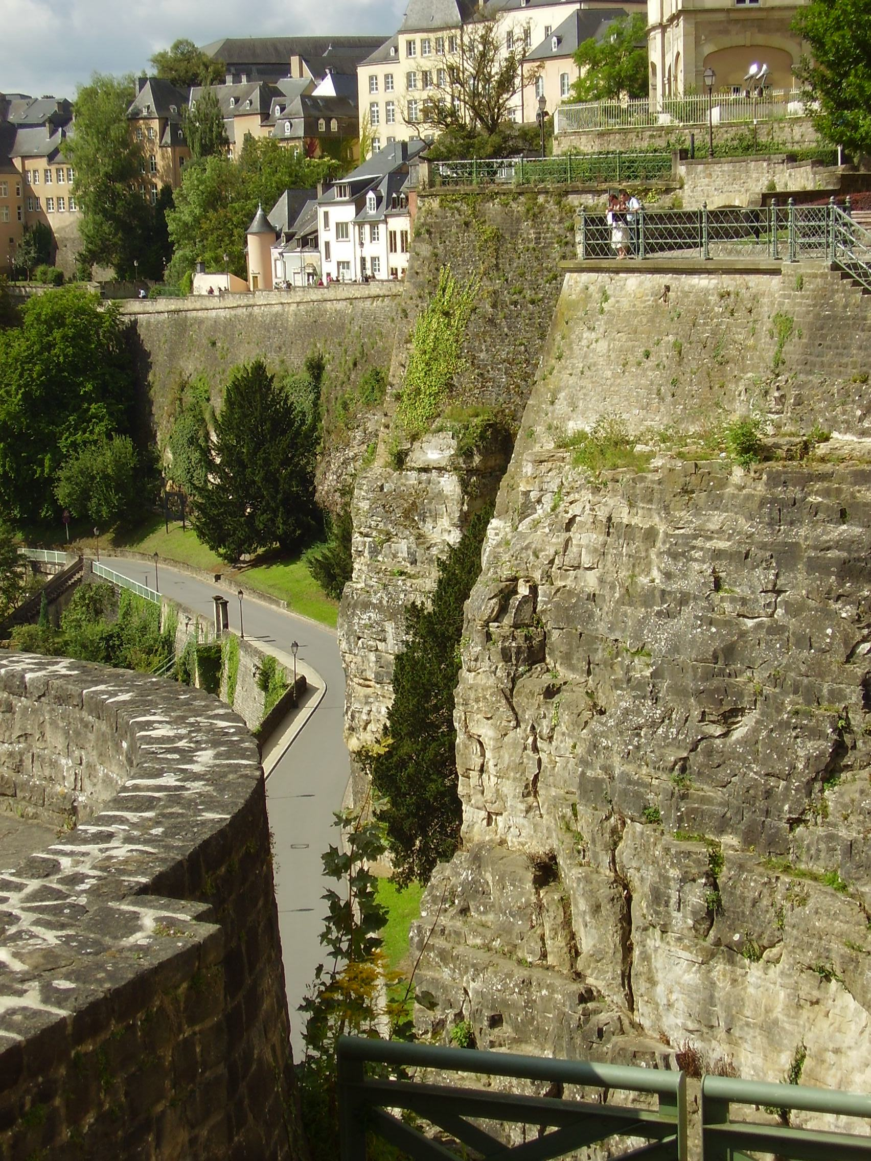 Luxembourg Fortress